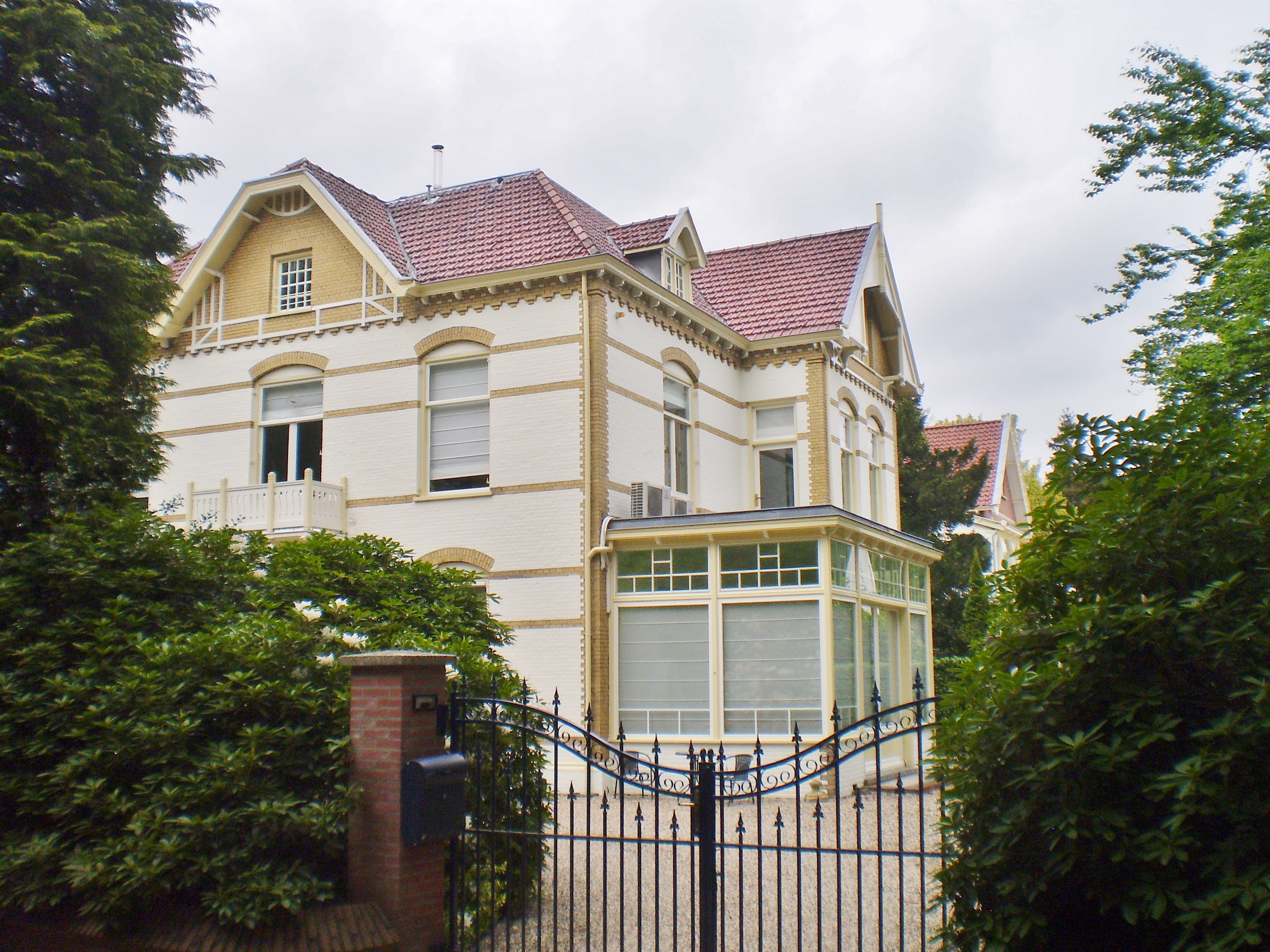 pand lijkt aan de Amsterdamsestraatweg te staan